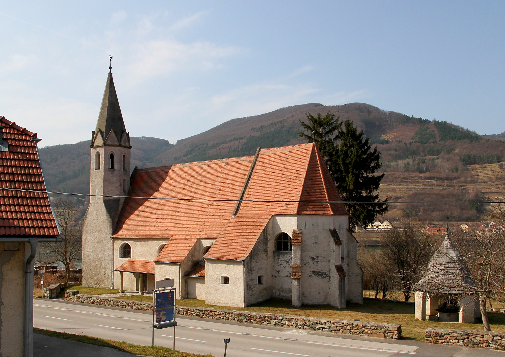 Die katholische Filialkirche hl. Johannes der Täufer in St. Johann im Mauerthale, eine Ortschaft in der niederösterreichischen Marktgemeinde Rossatz-Arnsdorf. Ein Kirchenbau aus der 1. Hälfte des 15. Jahrhunderts. Rechts ein barocker Brunnen mit einem schindelgedeckten Glockenhelm.